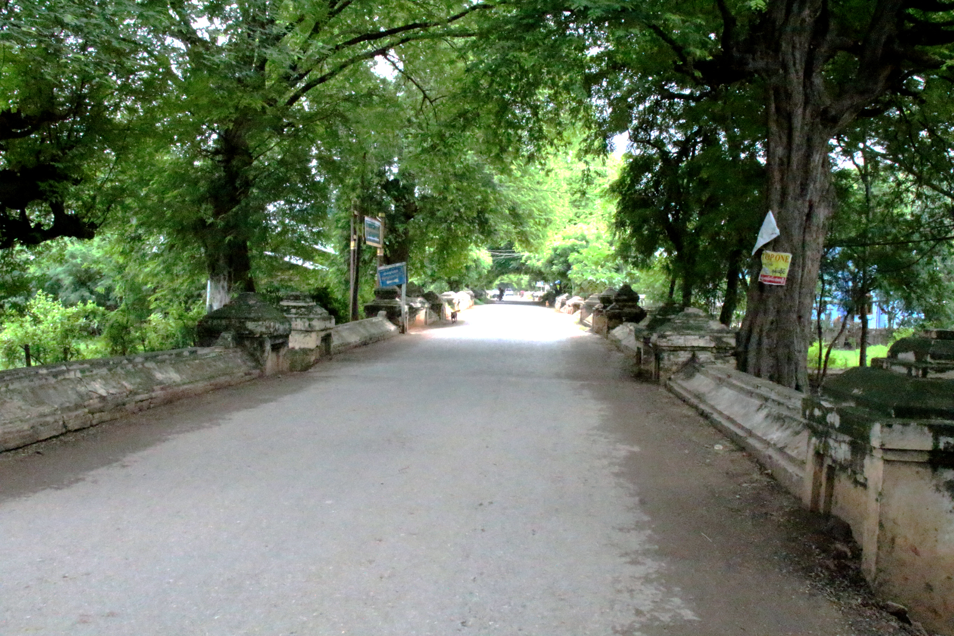 မြန်မာဘာသာ: မောင်အိုတံတား (အင်းဝ)